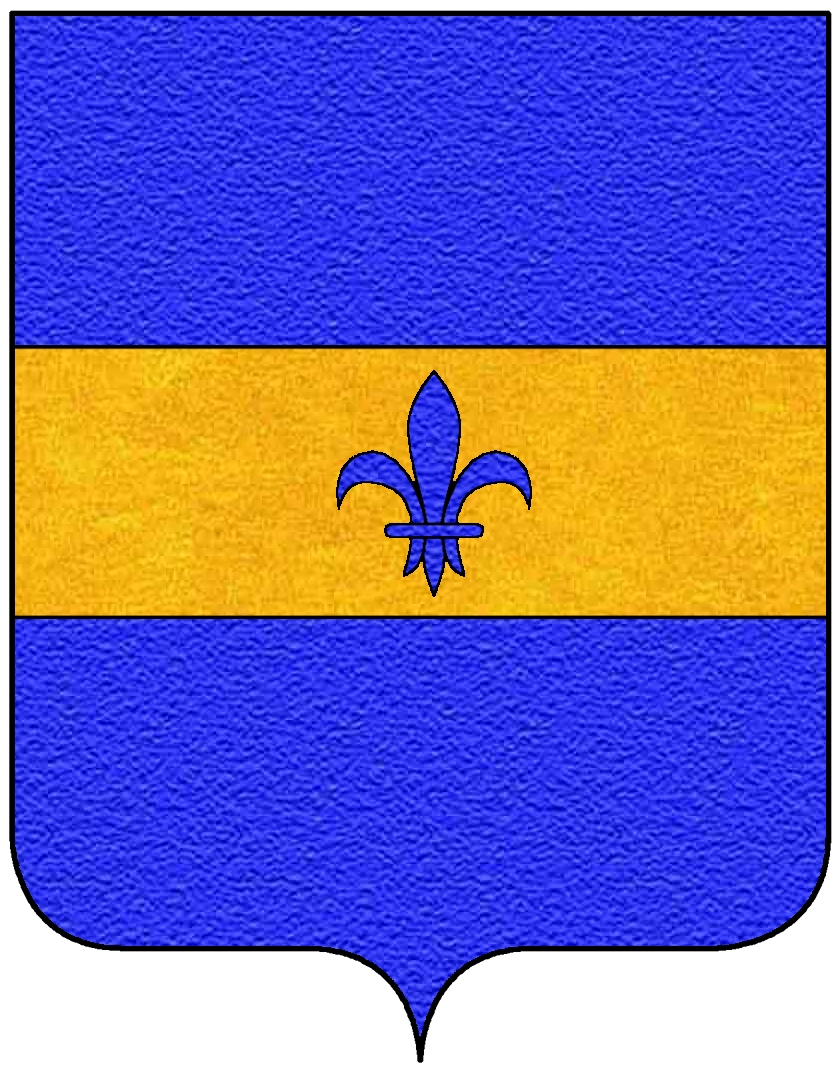 Stemma della famiglia Bucchia